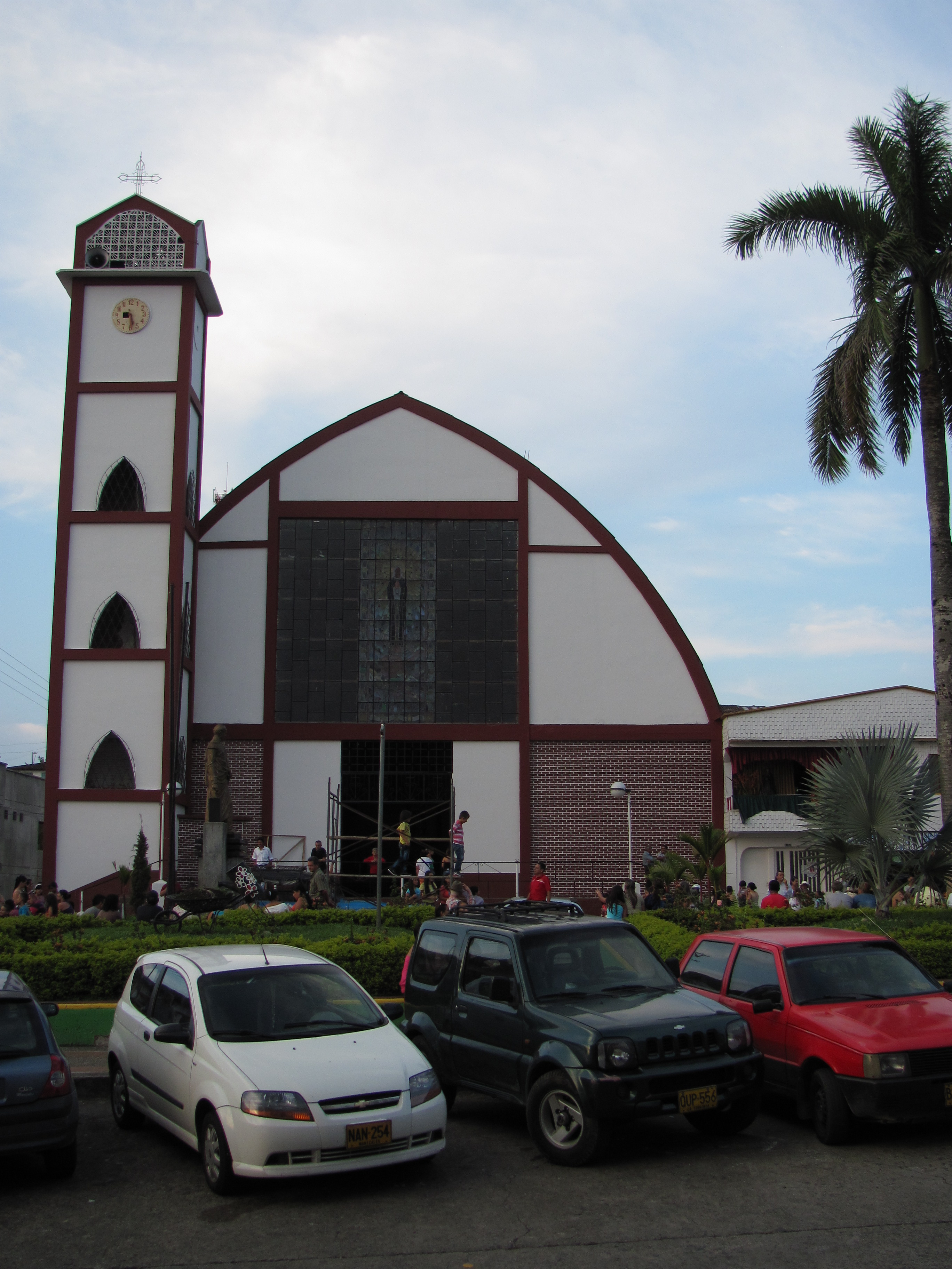 Toma frontal Iglesia de Belalcazar Caldas. 17088